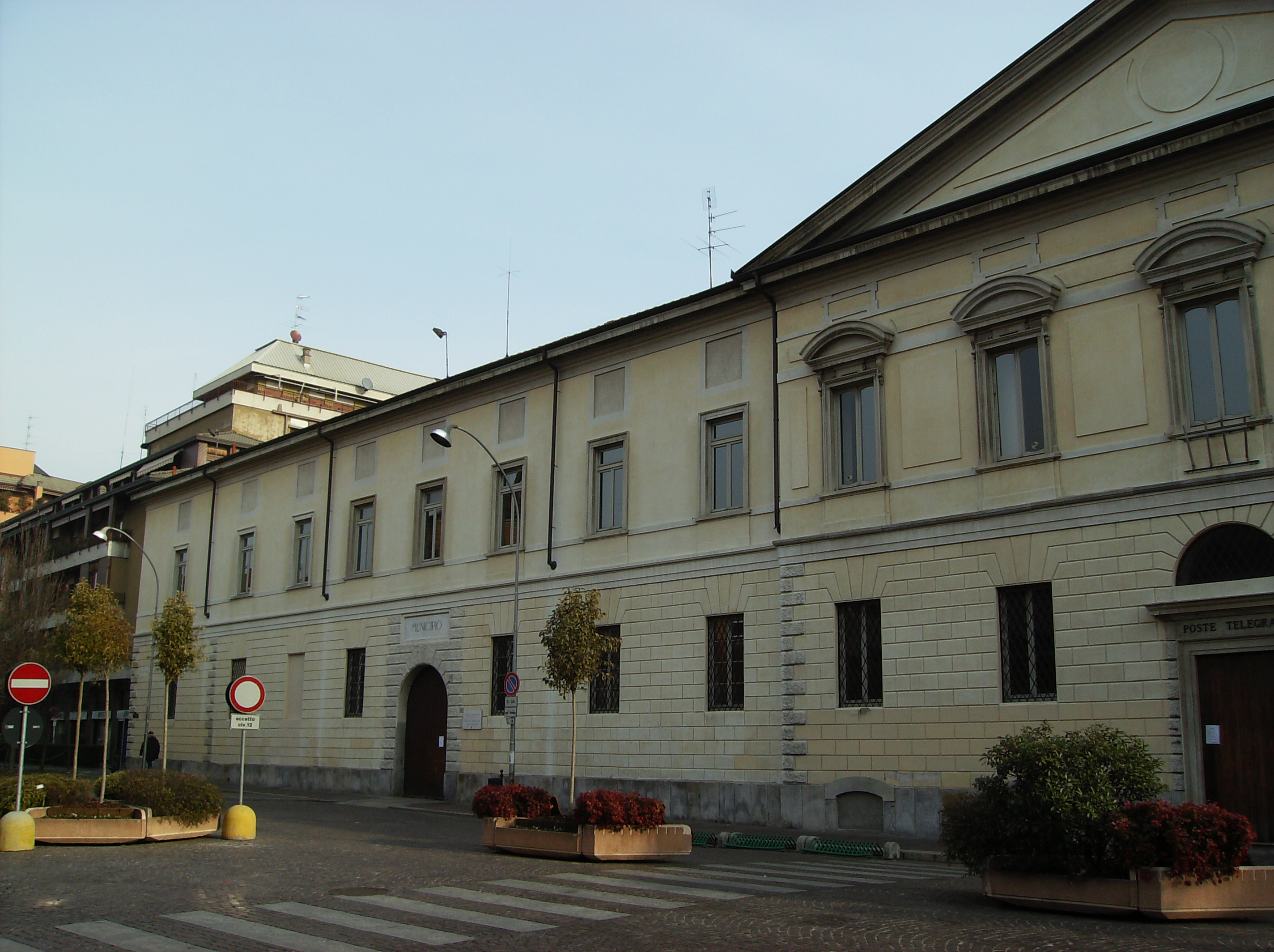 Palazzo Girardoni a Busto Arsizio, oggi sede del municipio